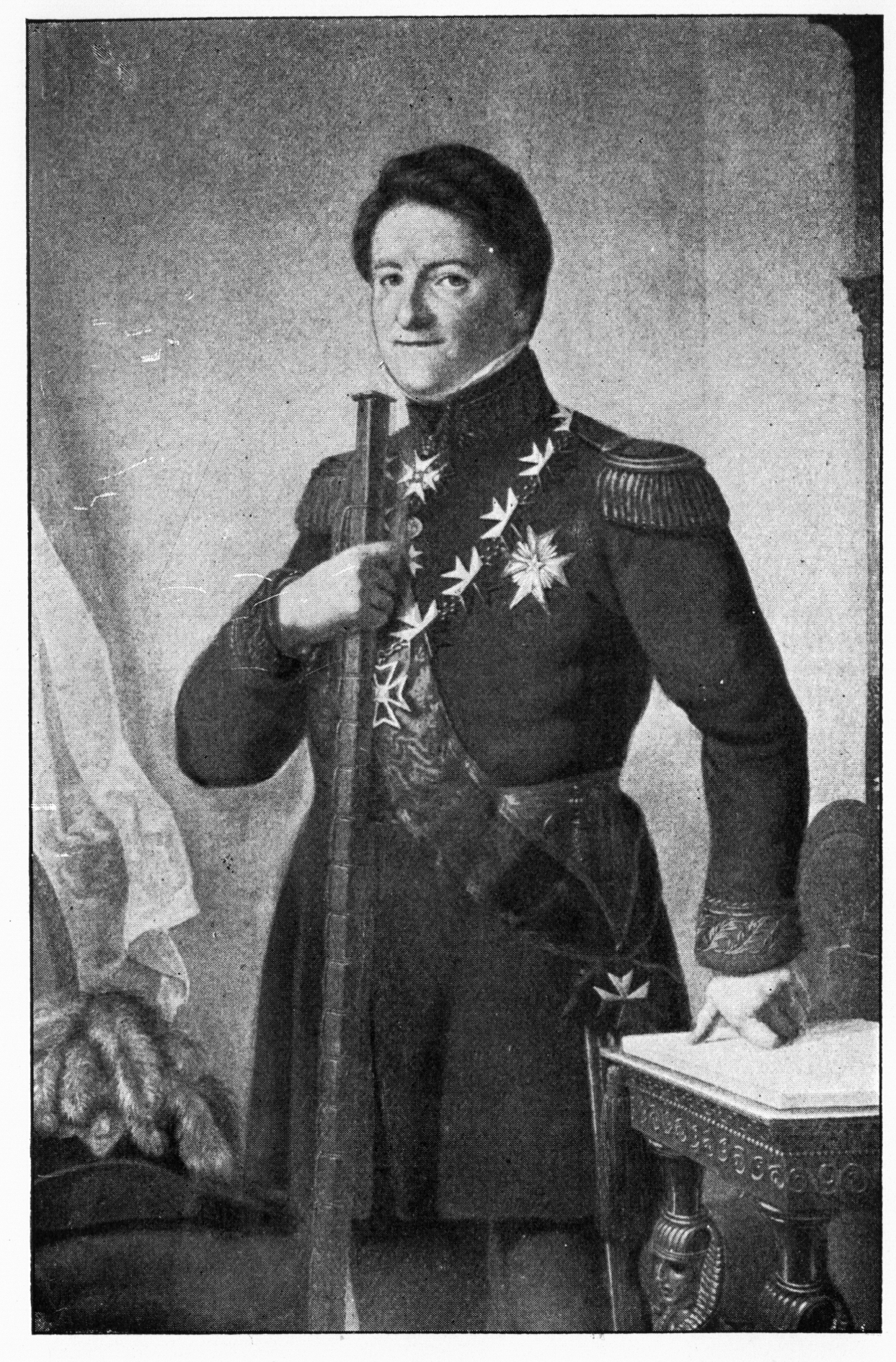 Portrait